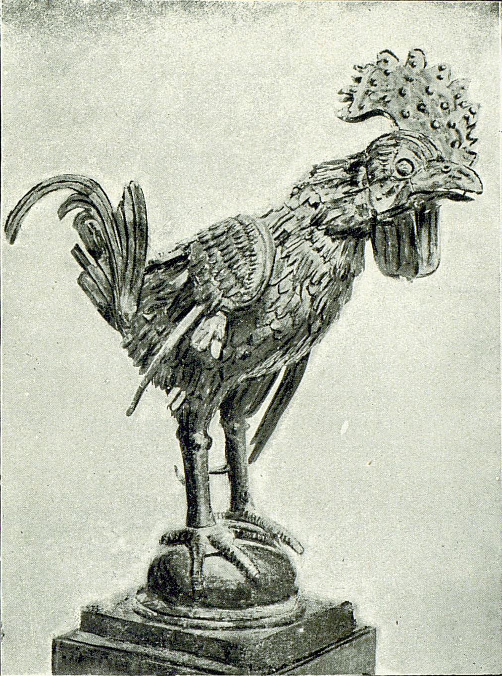 Photographie dans Description de l'horloge astronomique de la cathédrale de Strasbourg.